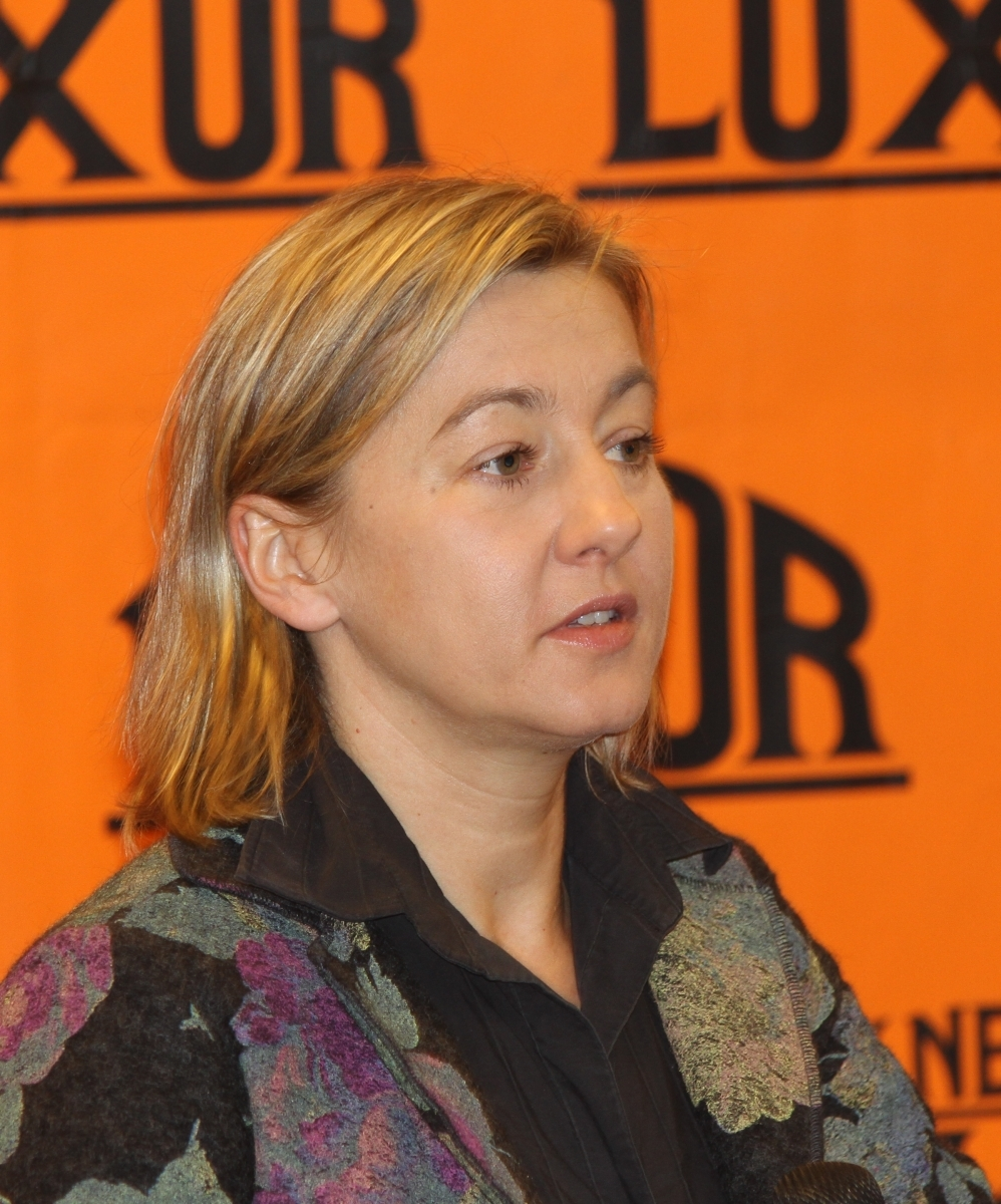 Vanda Hybnerová, česká herečka